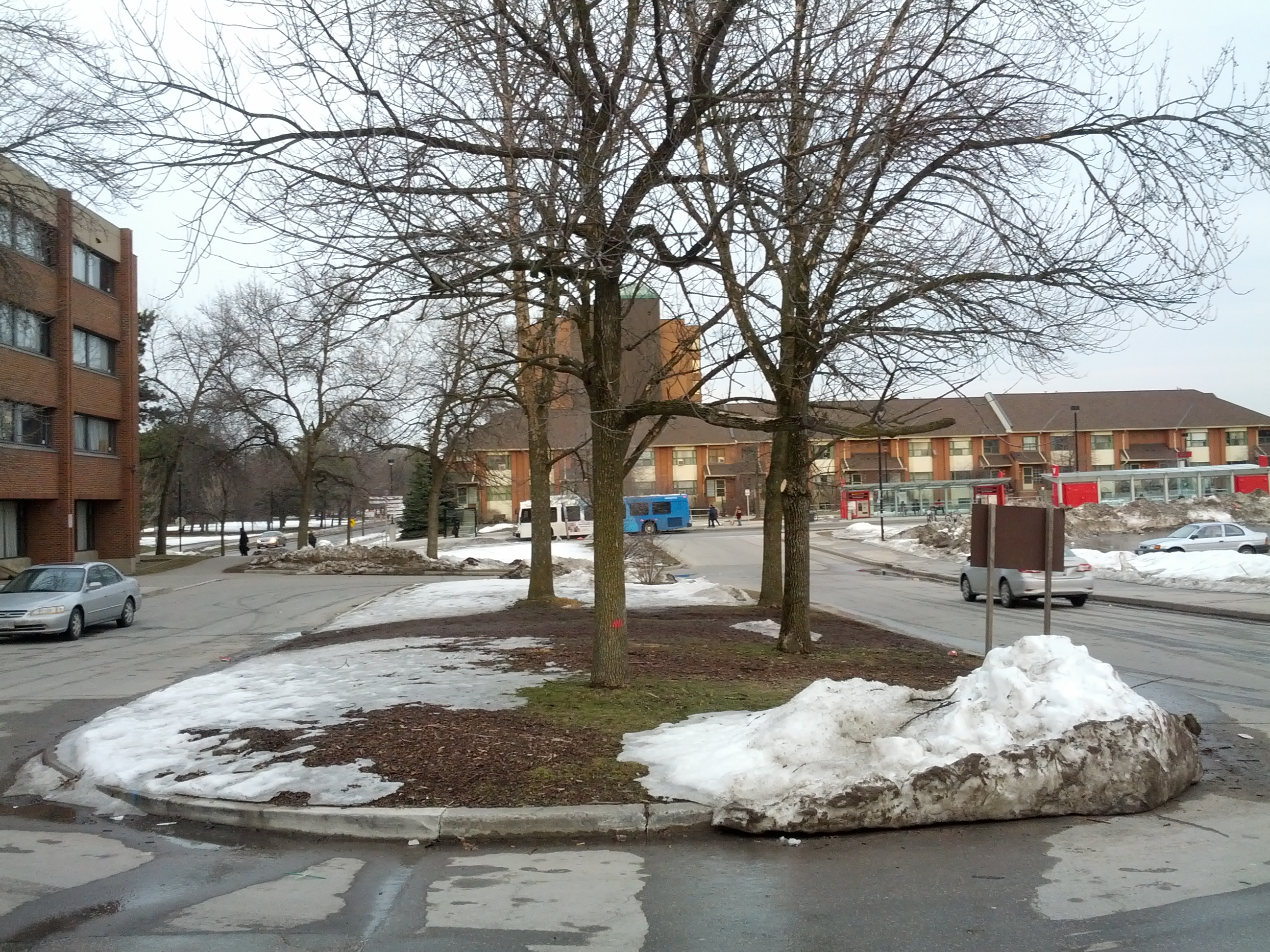 Gelo no estacionamento da York University, em Toronto, Canadá, com 13 graus celsius positivos.